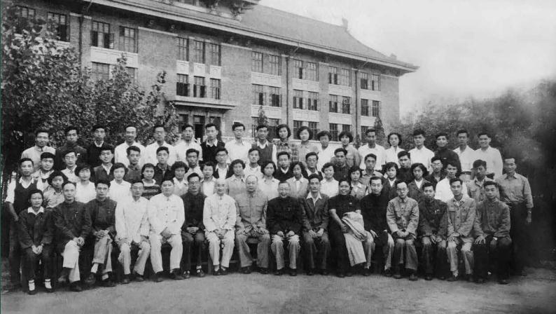 中文（中国大陆）: 天津大学建筑系1952级本科生毕业照